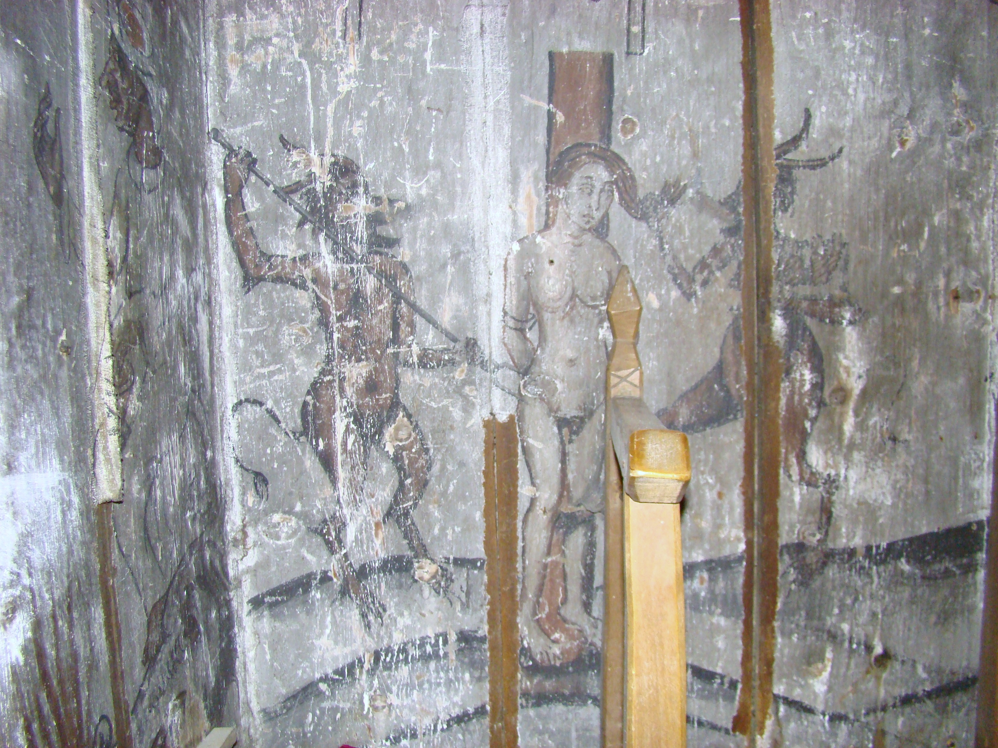 Biserica de lemn "Sfântul Dumitru" , sat DUBEŞTI; comuna OHABA LUNGĂ